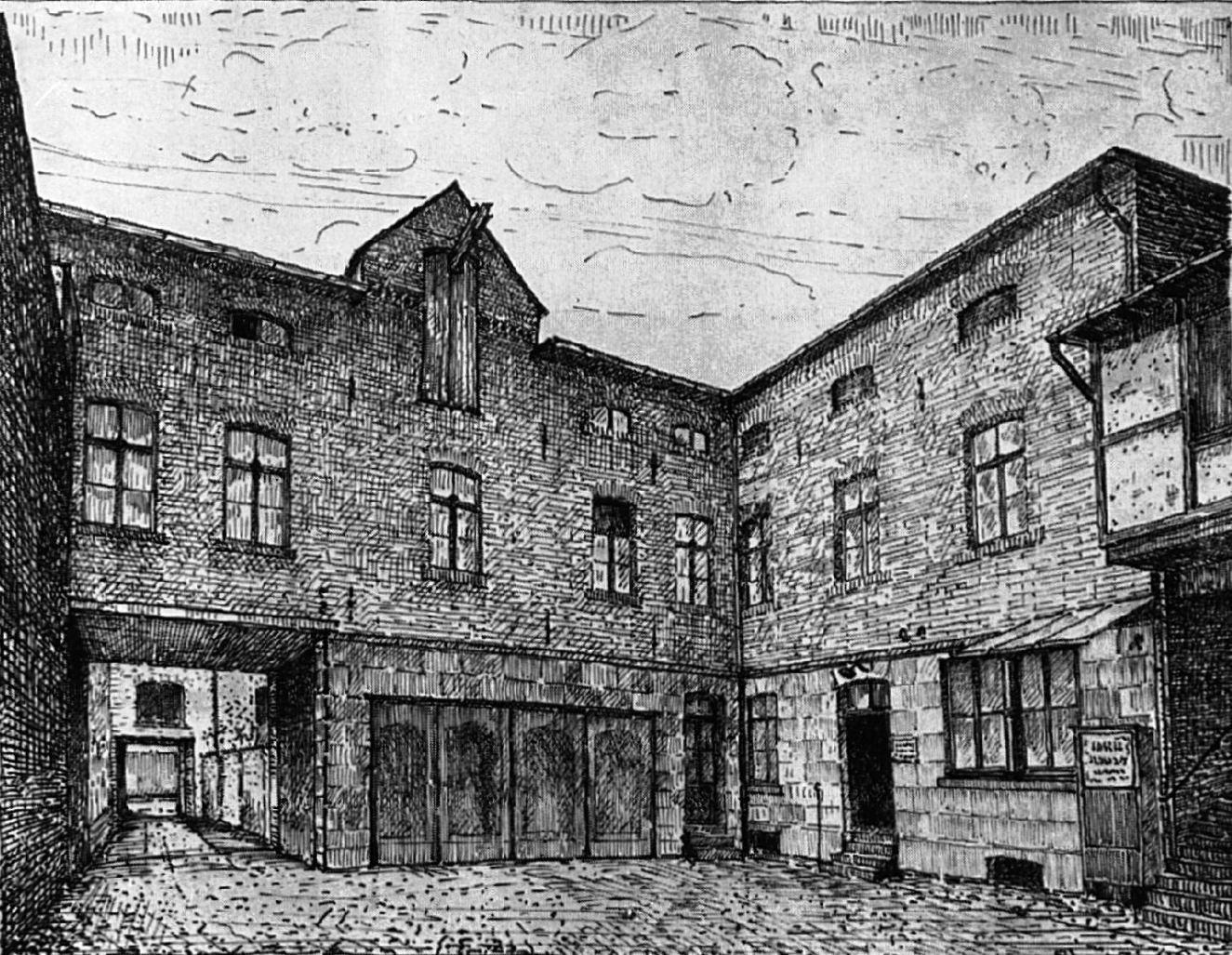 Handwerksbetrieb von Joseph Losenhausen (1851–1919), Maschinenfabrikant, an der Talstraße in Düsseldorf um 1850.jpg